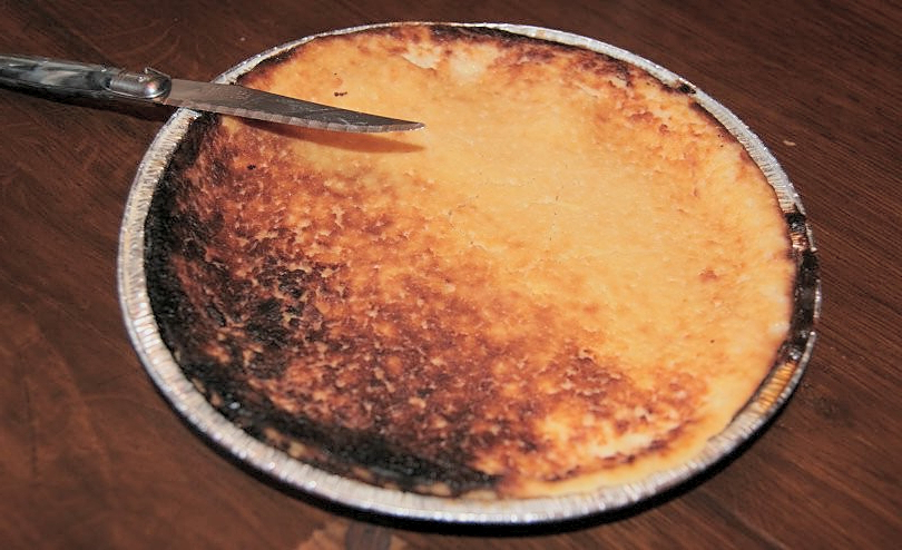 Tarte à la tomme et couteau Laguiole (chinois).